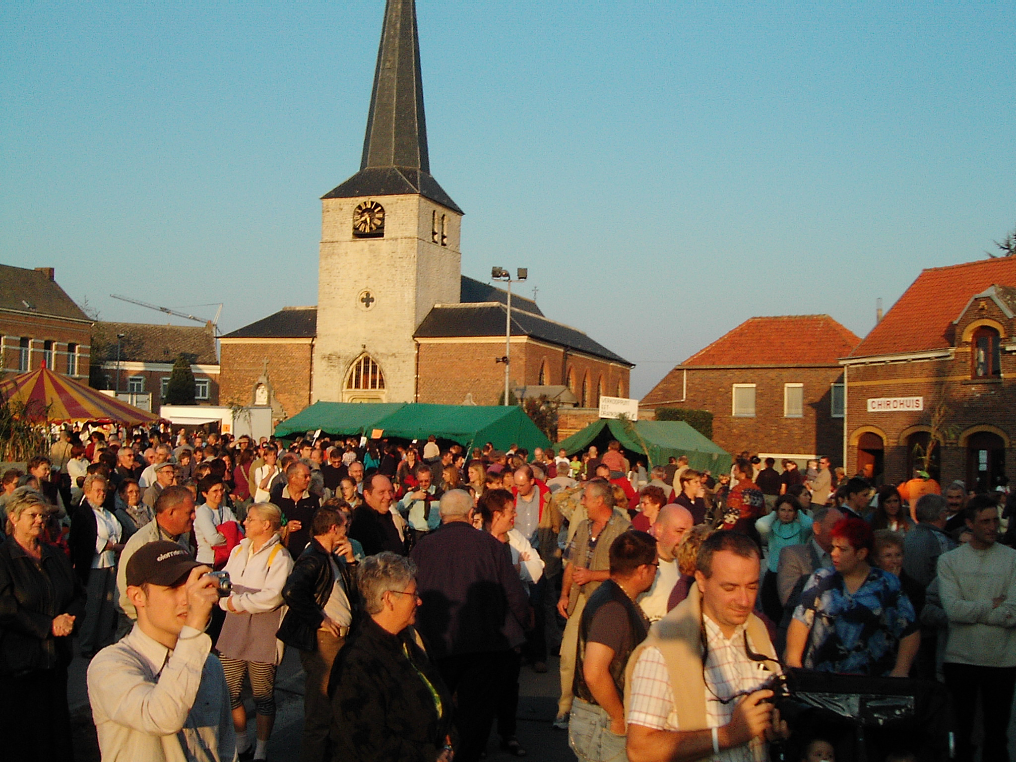 Sfeerbeeld van het pas nieuwe (sinds 2005) dorp te Heffen tijdens de pompoendag